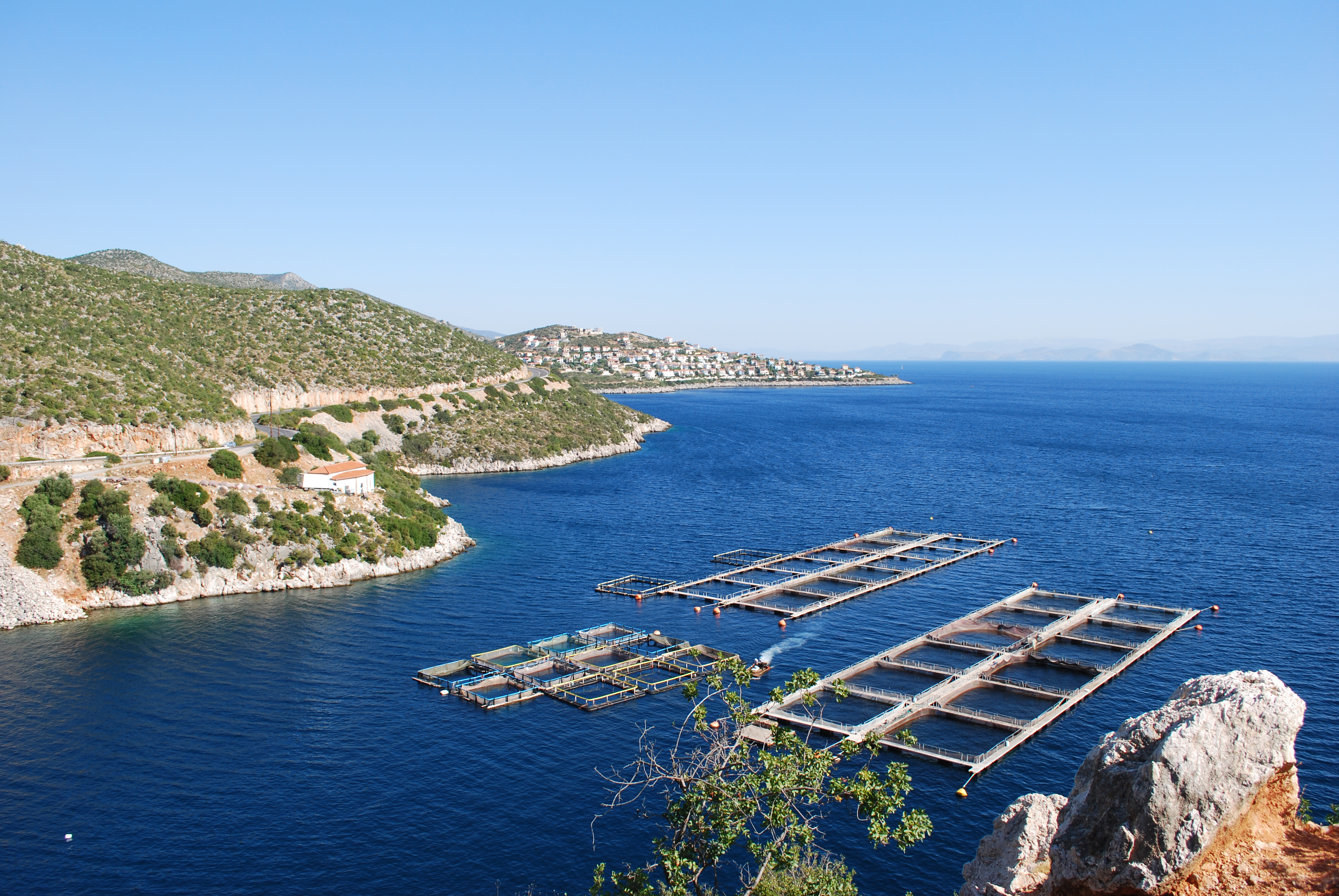 Vue du golfe Argolique, à proximité d'Astros.